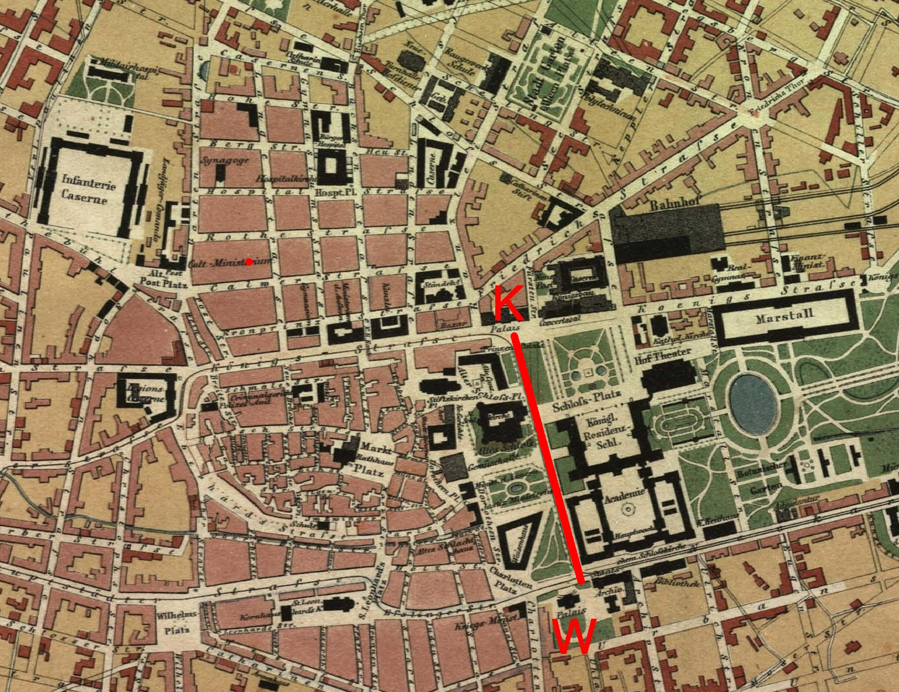 Stuttgart, Stadtplan von 1846 und 1871 von Friedrich Bohnert, Ausschnitt mit Kronprinzenpalais (rotes K), W = Wilhelmspalais (rotes W) und Planie (rote Verbindungdslinie). Norden liegt in der rechten oberen Ecke des Plans (in Richtung der Friedrichstraße).